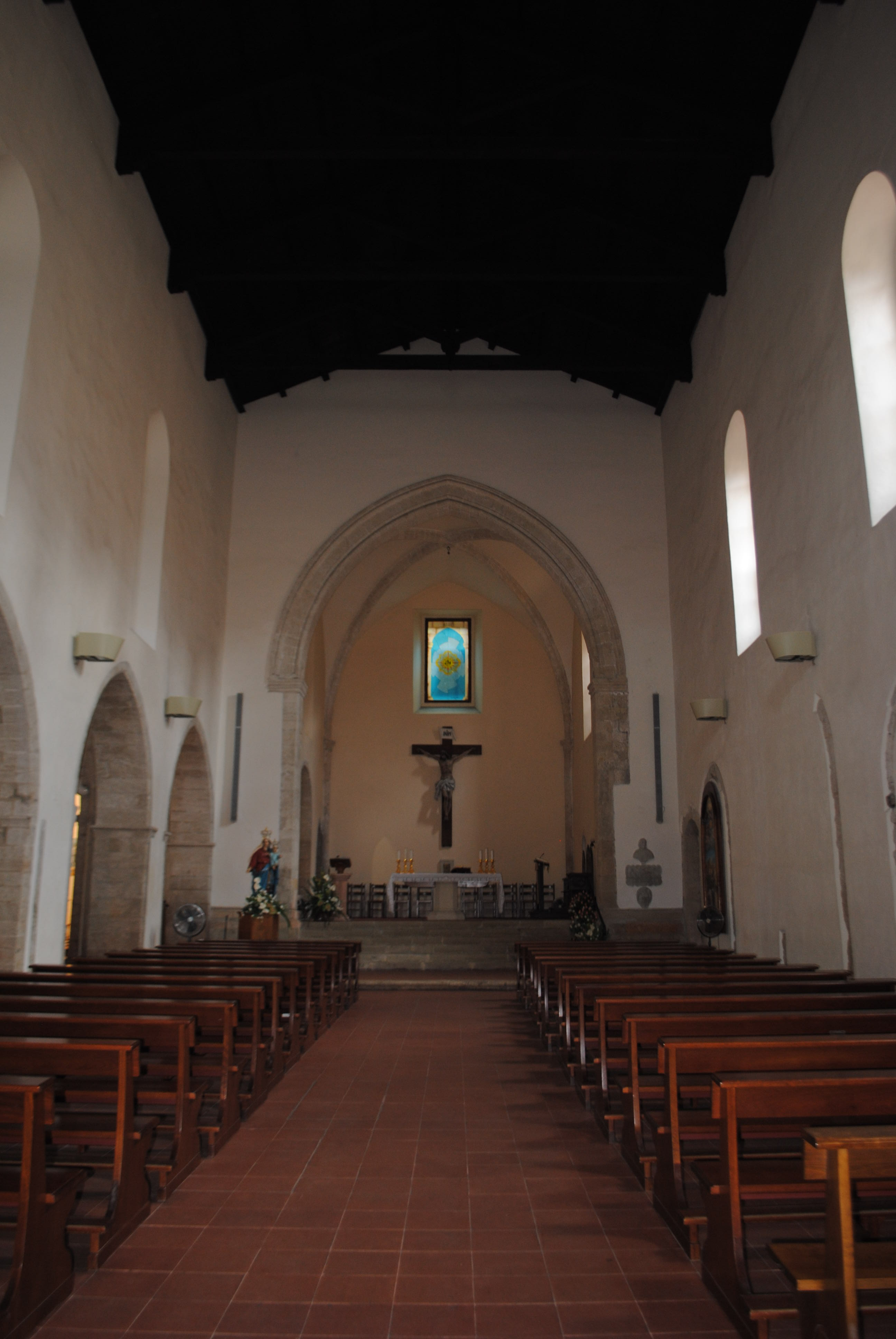 Convento di San Bernardino da Siena This is a photo of a monument which is part of cultural heritage of Italy.